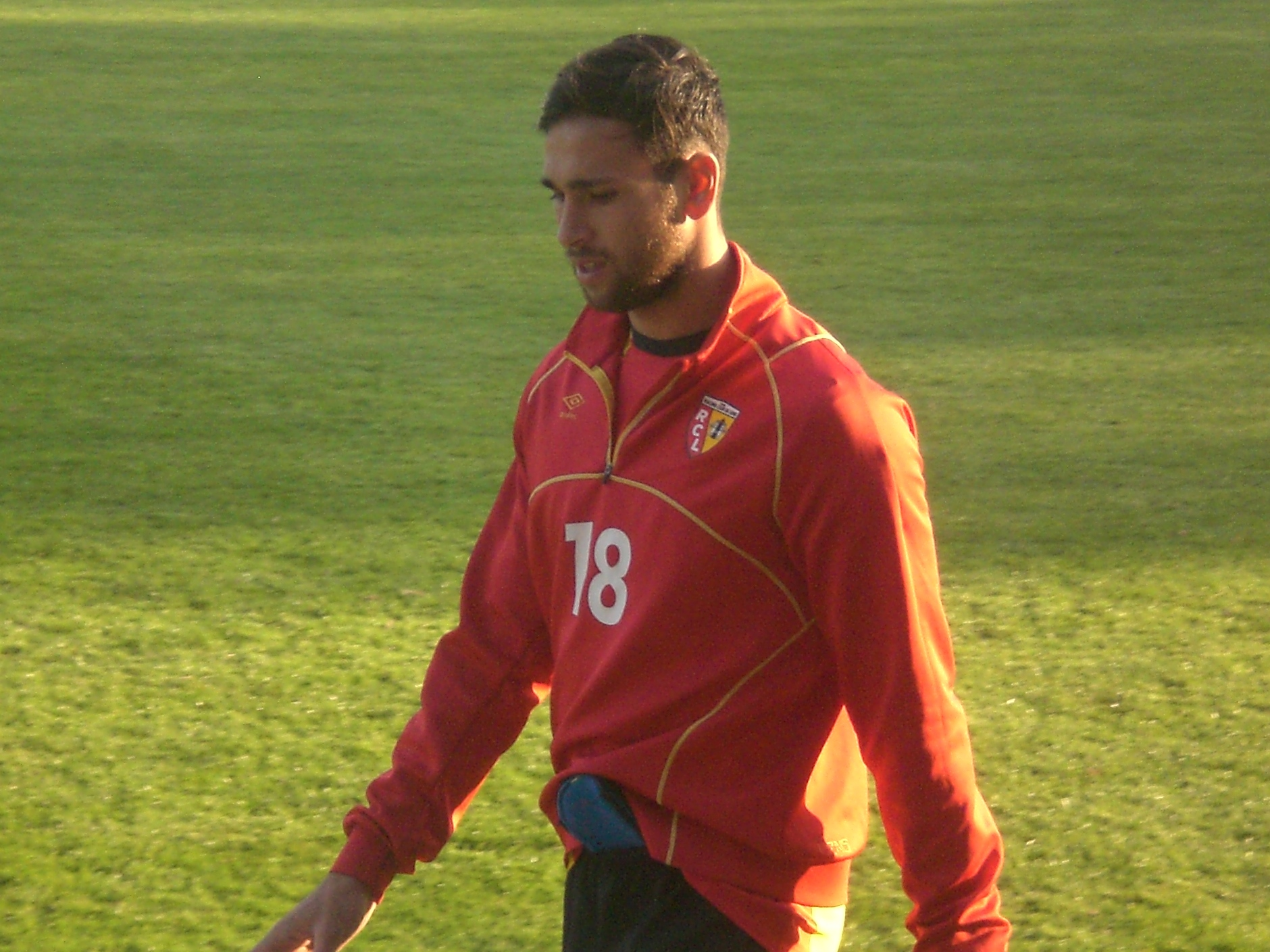 Romain Spano avant le match RC Lens B / US Quevilly Rouen, comptant pour la septième journée du Championnat de France de football amateur (CFA), le 3 octobre 2015, au Stade François Blin d'Avion.